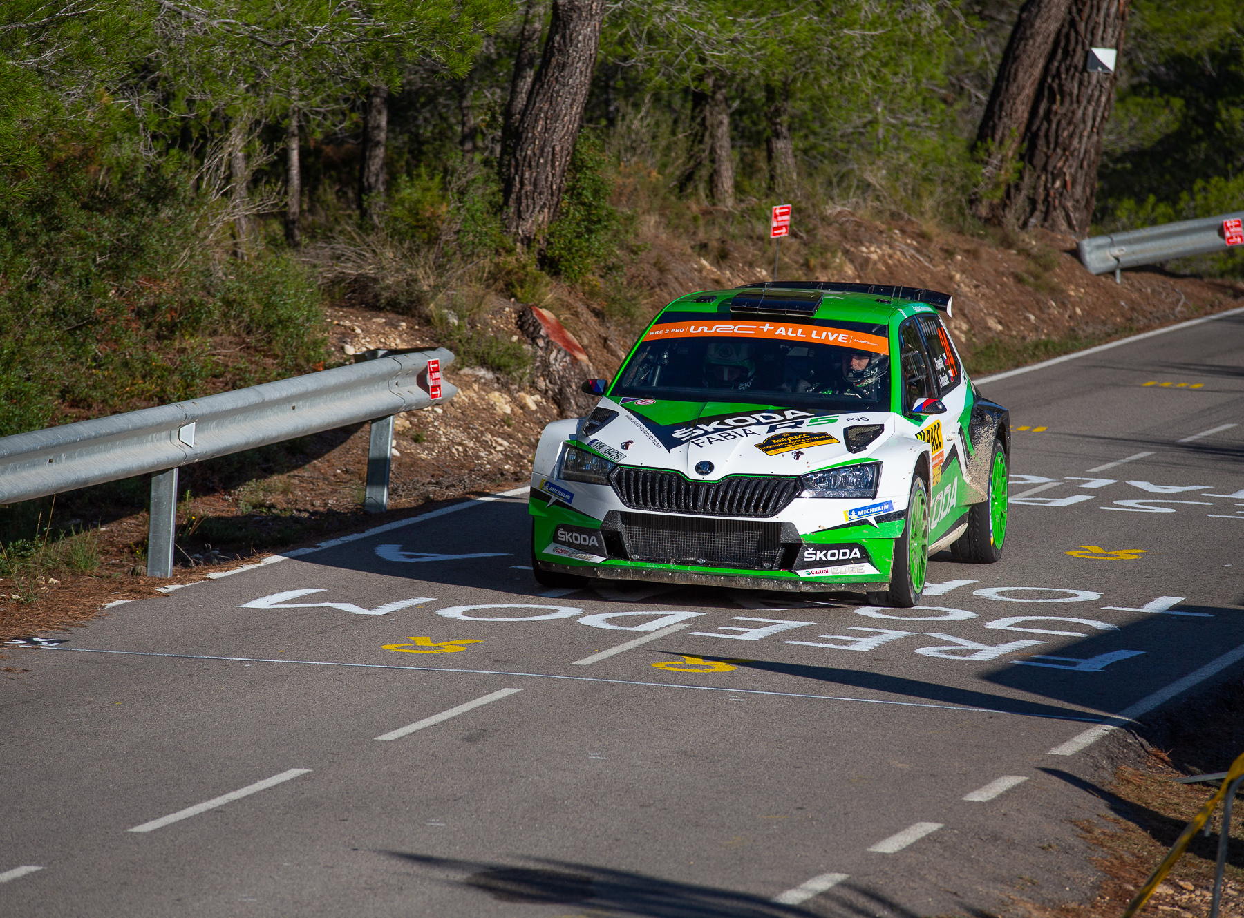 Rajd Hiszpanii 2019 - Kopecký Jan